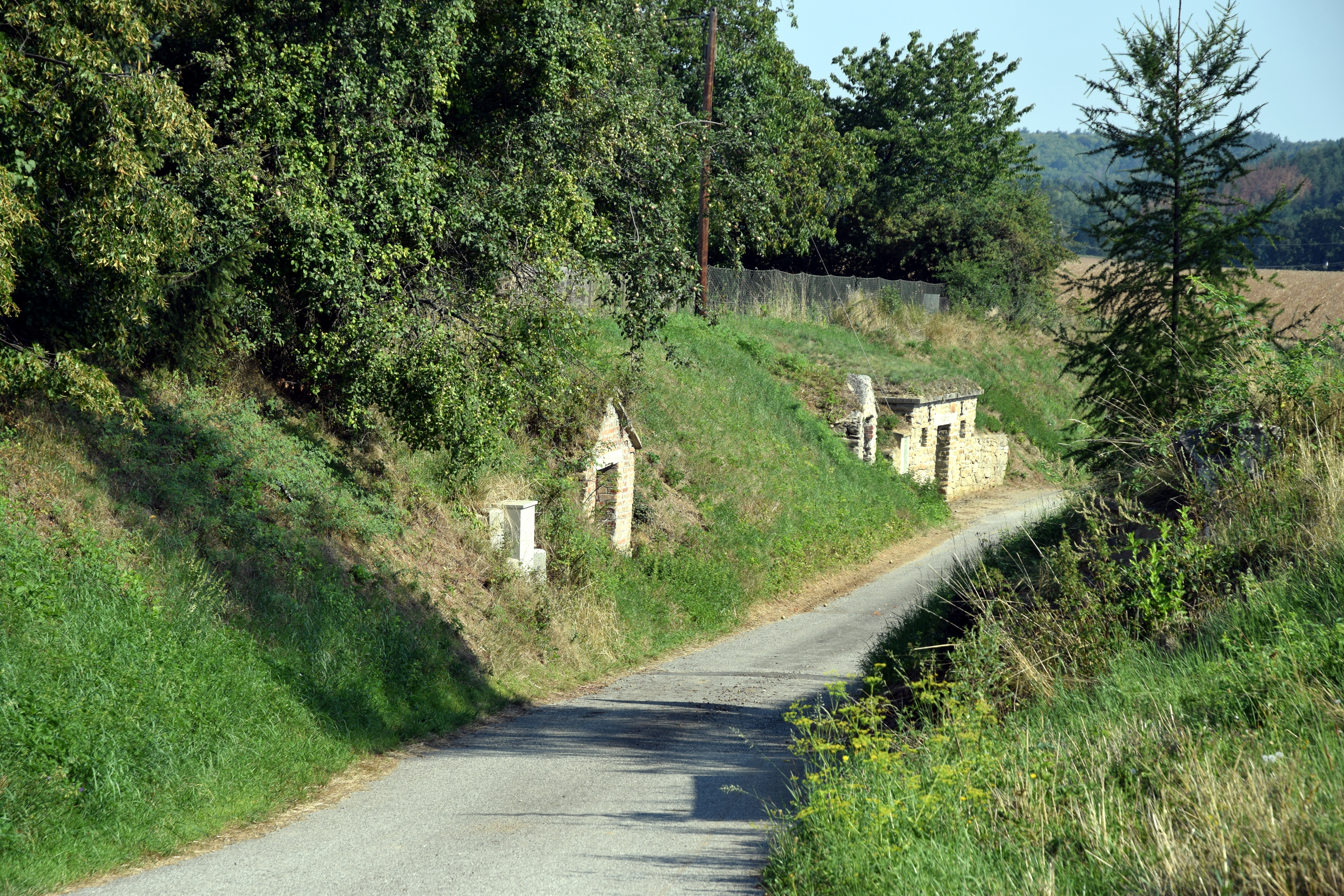 Kellergasse Kellerweg in der KG Niederfladnitz in Hardegg (Niederösterreich)